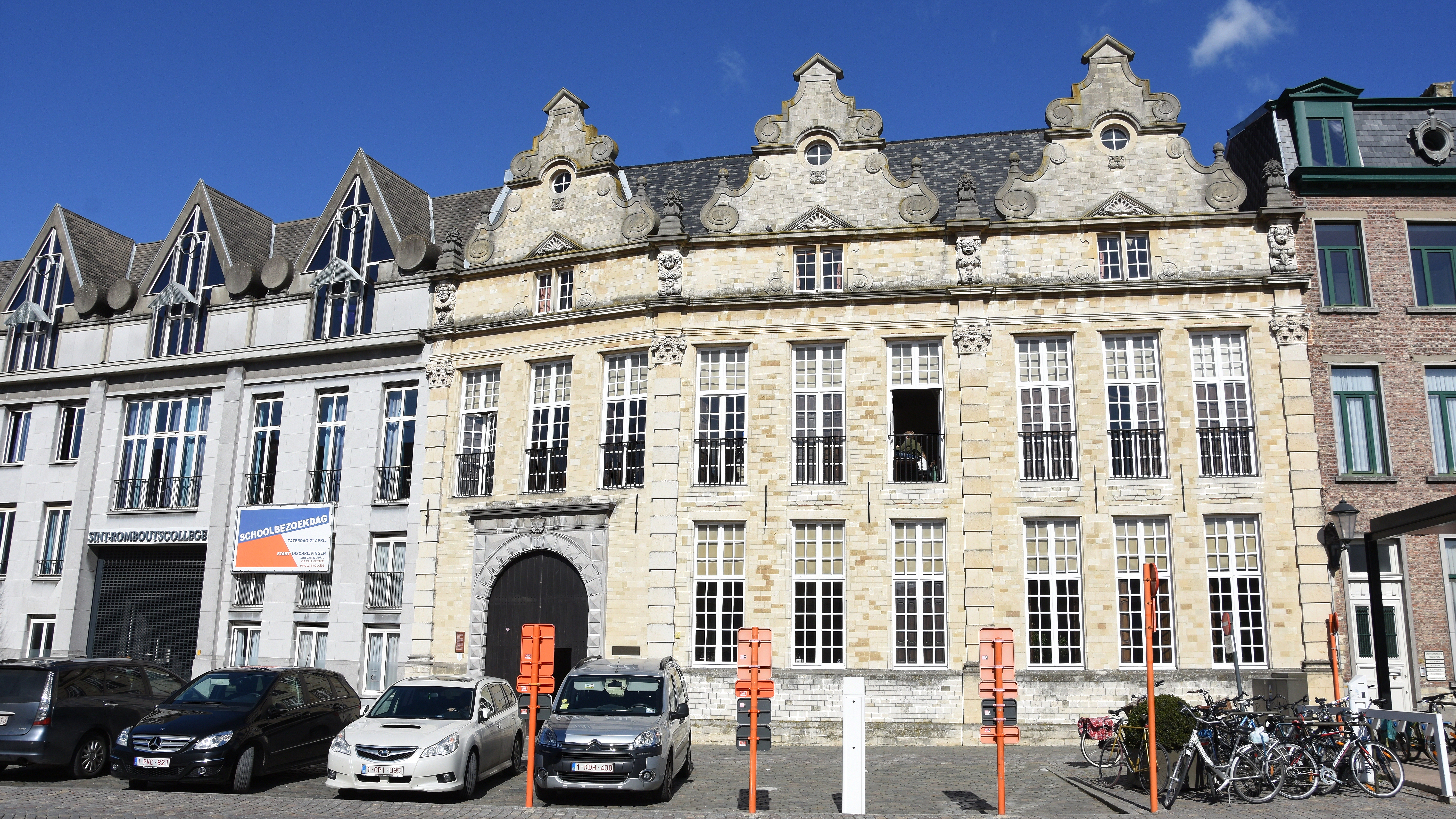 Sint-Romboutscollege - Mechelen, België